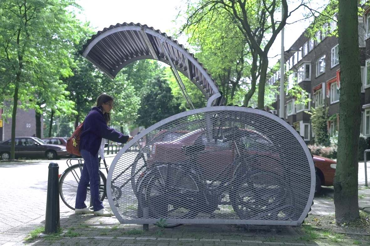 De Fietshangar wordt gebruikt in Rotterdam en in vele andere gemeenten in Nederland.